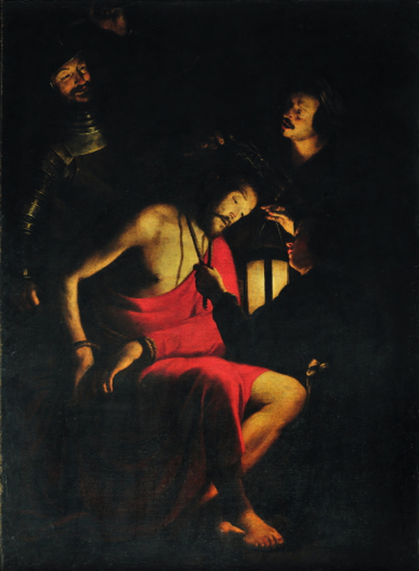 The Candlelight Master (I половина XVII века). Incoronozione di spine. Santa Maria in Aquiro (Chapel of the Pietà).